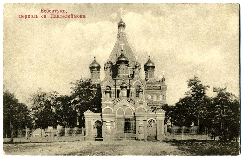 Церковь Святого Пантелеимона old1910